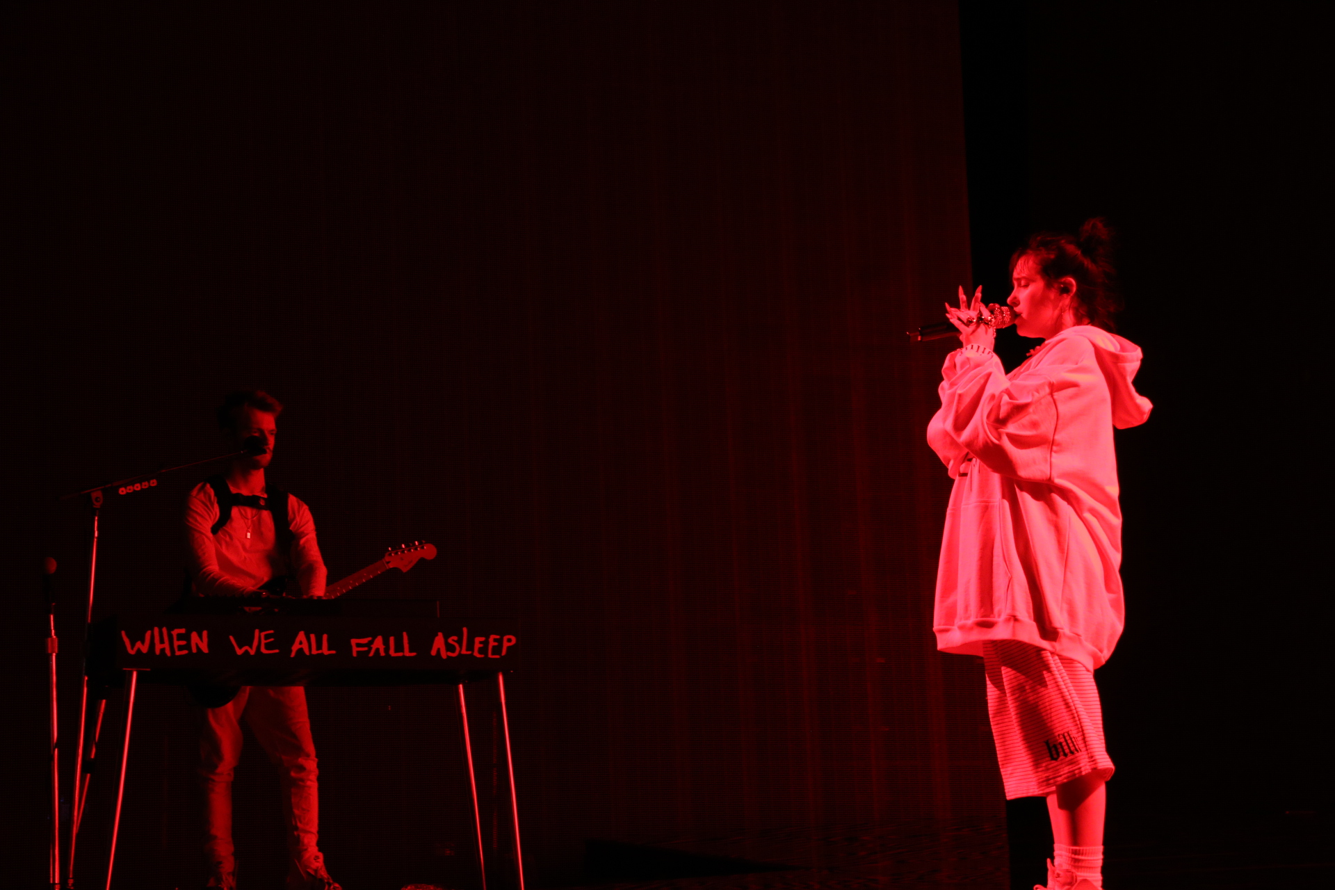 Billie Eilish ::: Red Rocks::: 06.05.19